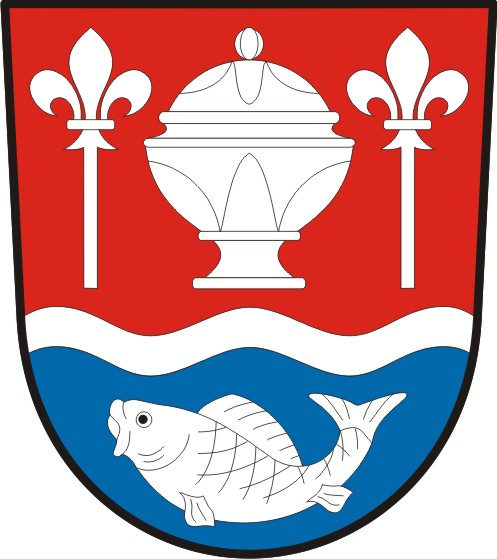 Řečany nad Labem